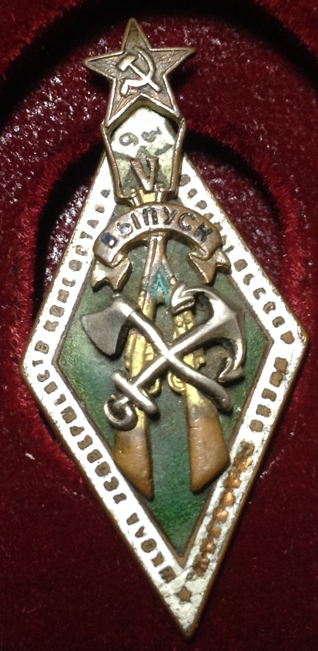 Нагрудный знак выпускника Школы Усовершенствования Командного состава (ШУКС) Охраны Путей Сообщения имени Я.Э. Рудзутака, 1931 год, 5 выпуск. Фамилия затерта, т.к. Я.Э. Рудзутак был репрессирован.